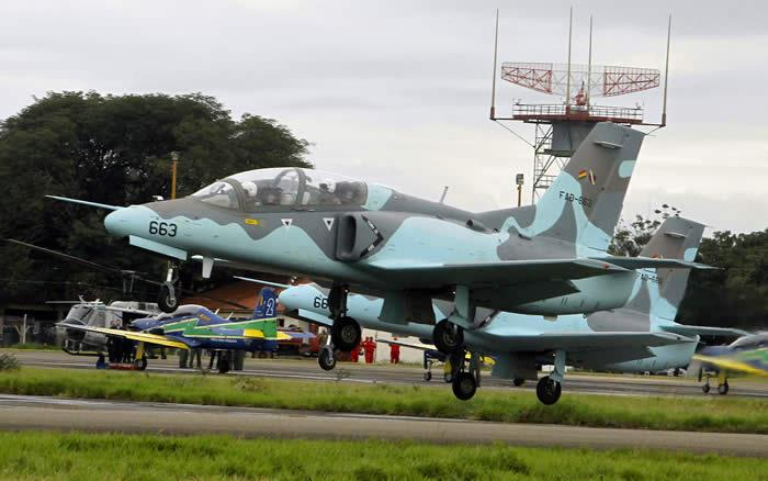 k-8 bolivianos despegando